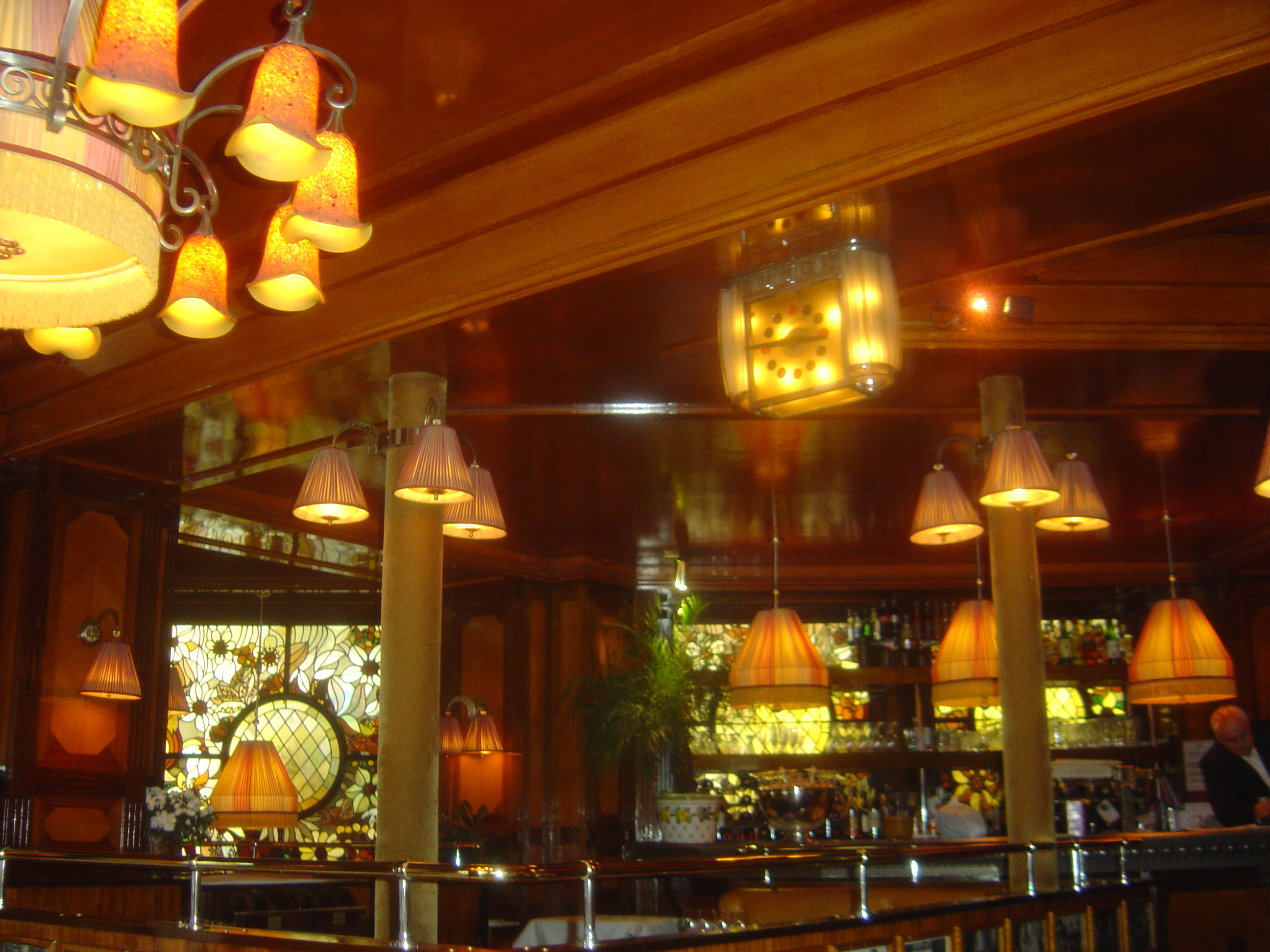 Εσωτερικό στο Καφέ Ντομ, Παρίσι - Μονπαρνάς, 2011